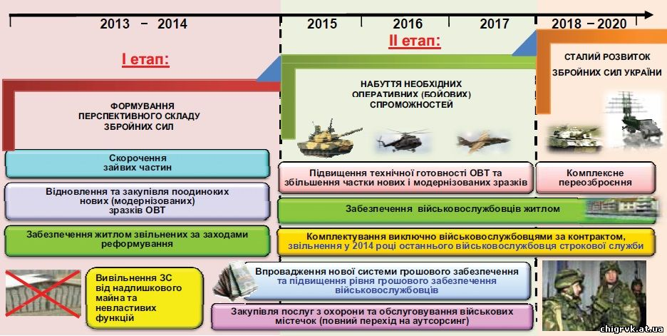 Етапи реформування і розвитку Збройних Сил України на період до 2017 року